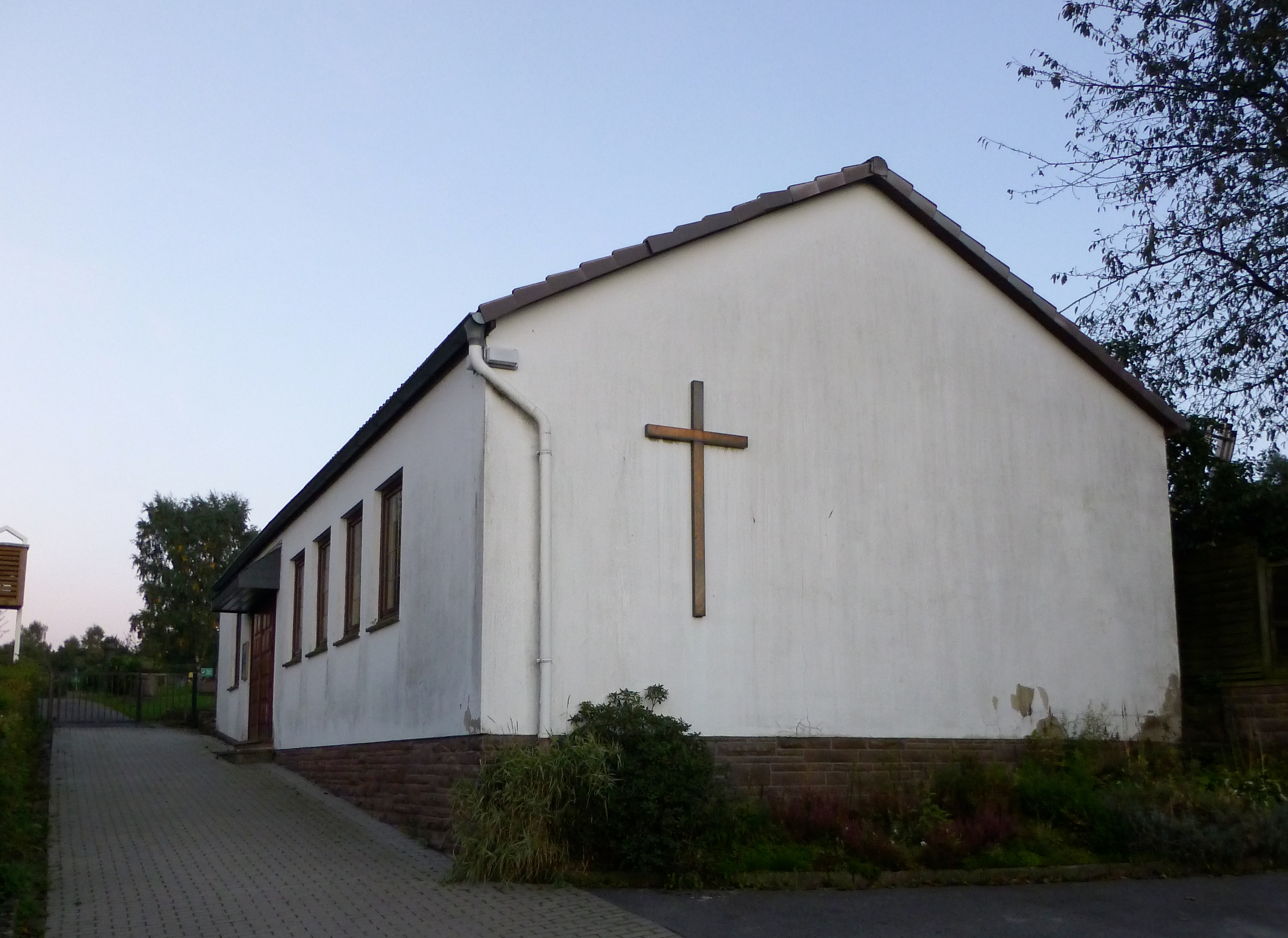 Friedhofskapelle und ehemalige Dorfkapelle in Schorborn, Gemeinde Deensen, Landkreis Holzminden, Niedersachsen. Die Kapellengemeinde ging 2009 in der Kirchengemeinde Deensen-Arholzen auf